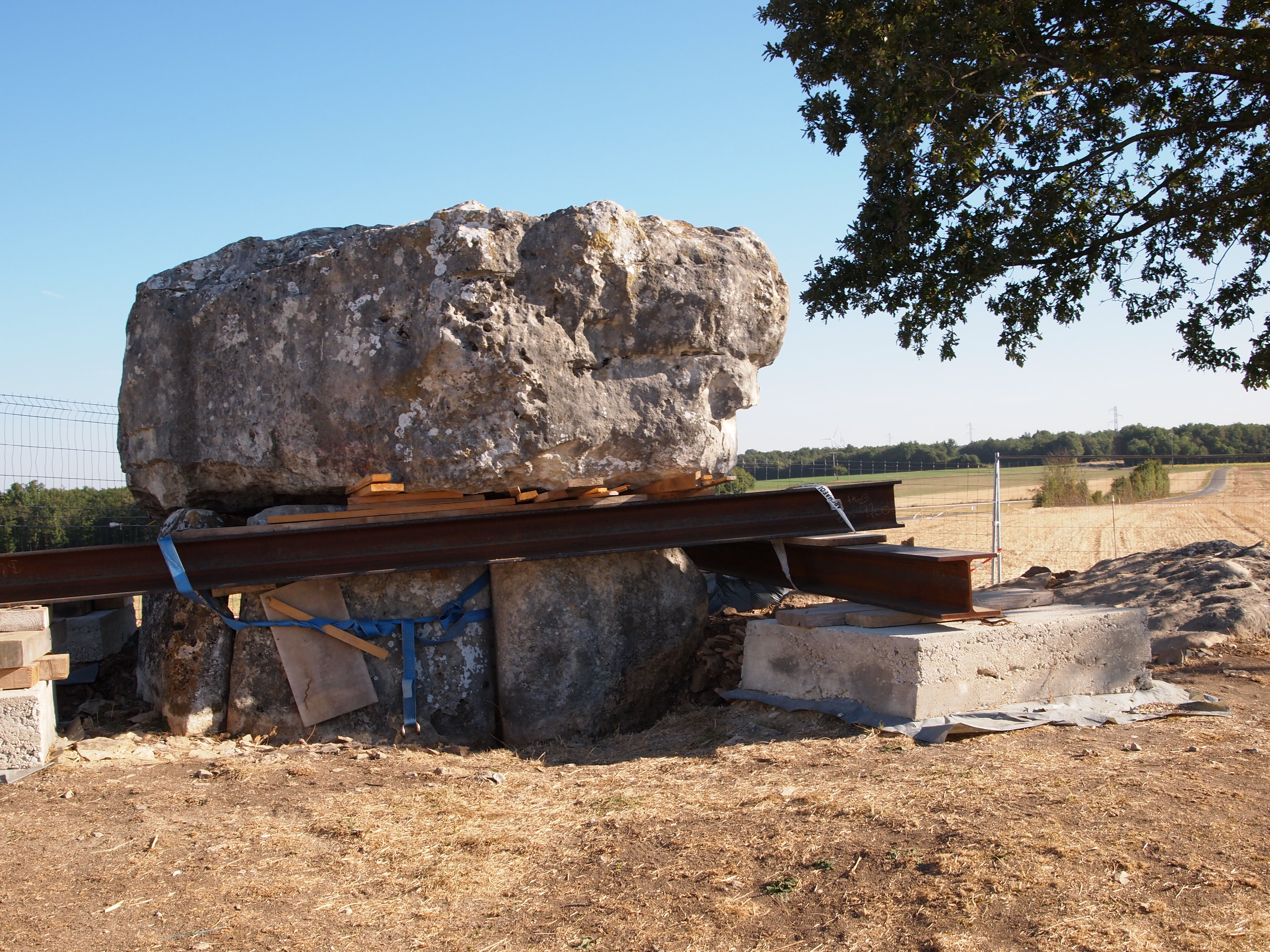 Dolmen de la Folatière, à Luxé en Charente (classé, 1957), en cours de fouilles